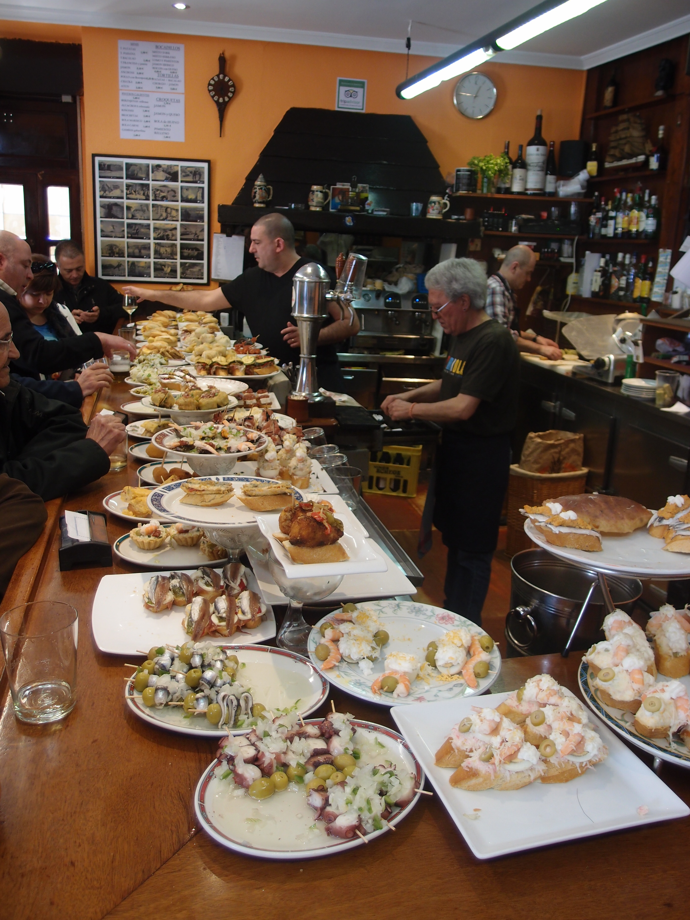 Pintxos in einer Altstadtbar von Donostia San Sebastian (span. Baskenland) Datum: 08.05.2014 Urheber: M. Pfeiffer alias Gordito1869 Quelle: Privates Fotoarchiv des Urhebers